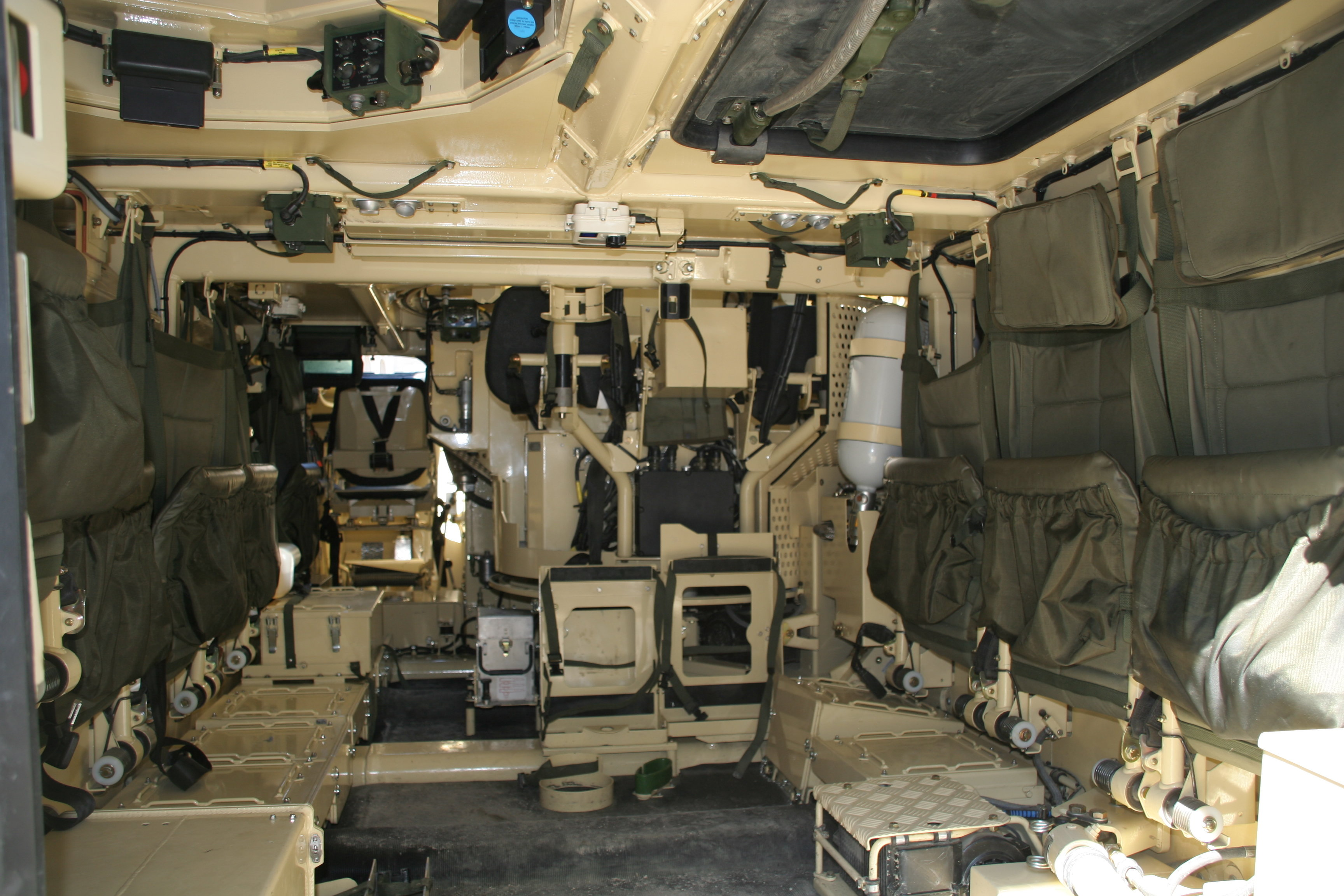 Schützenpanzer Ulan, Kampfraum von hinten Photographed by myself